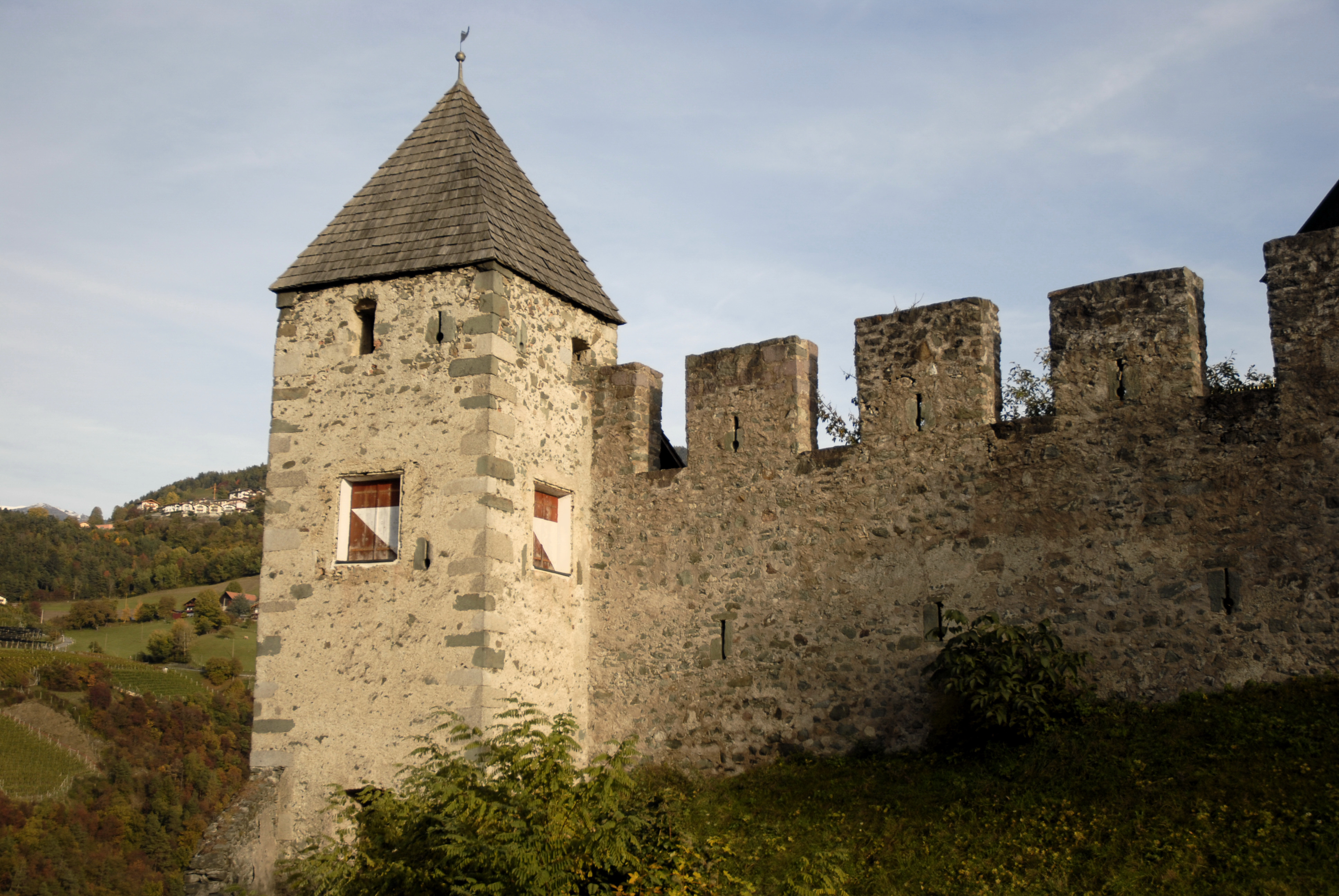 Schloss Summersberg in Gufidaun